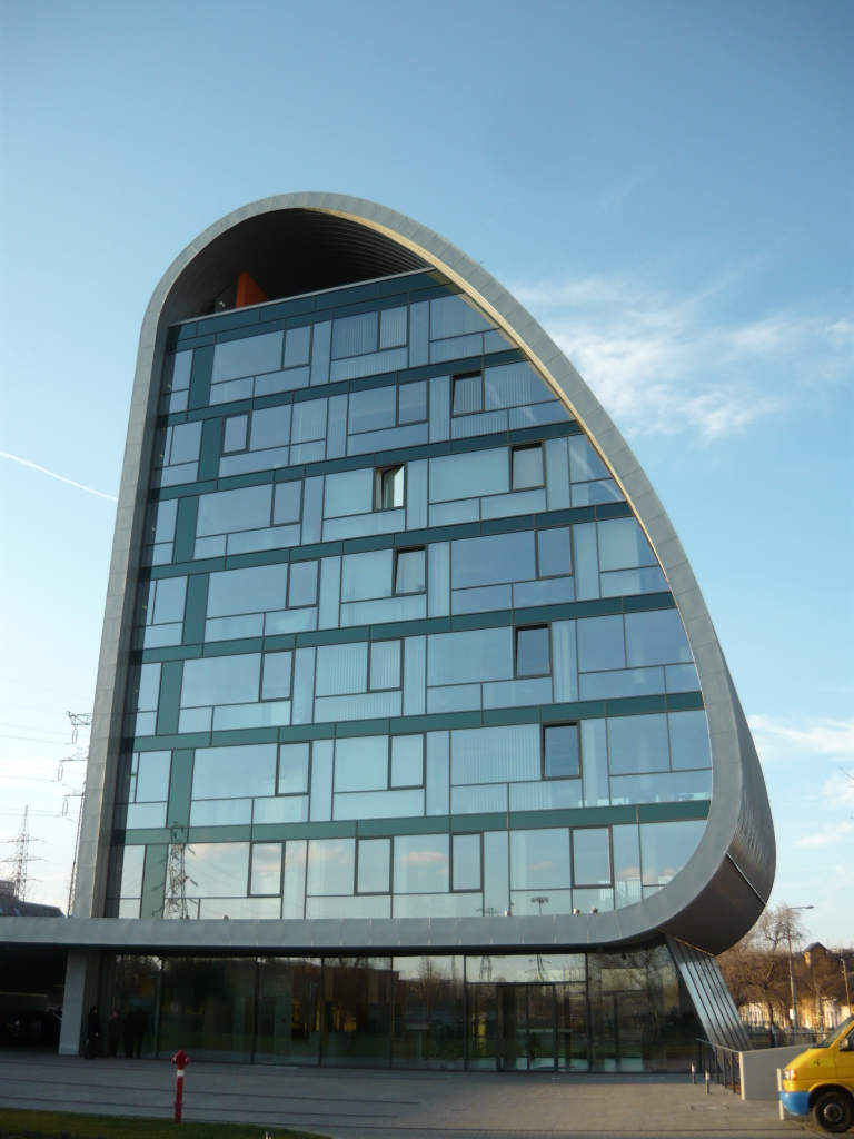 A Magyar Autóklub központi irodaháza Újpesten (Budapest)